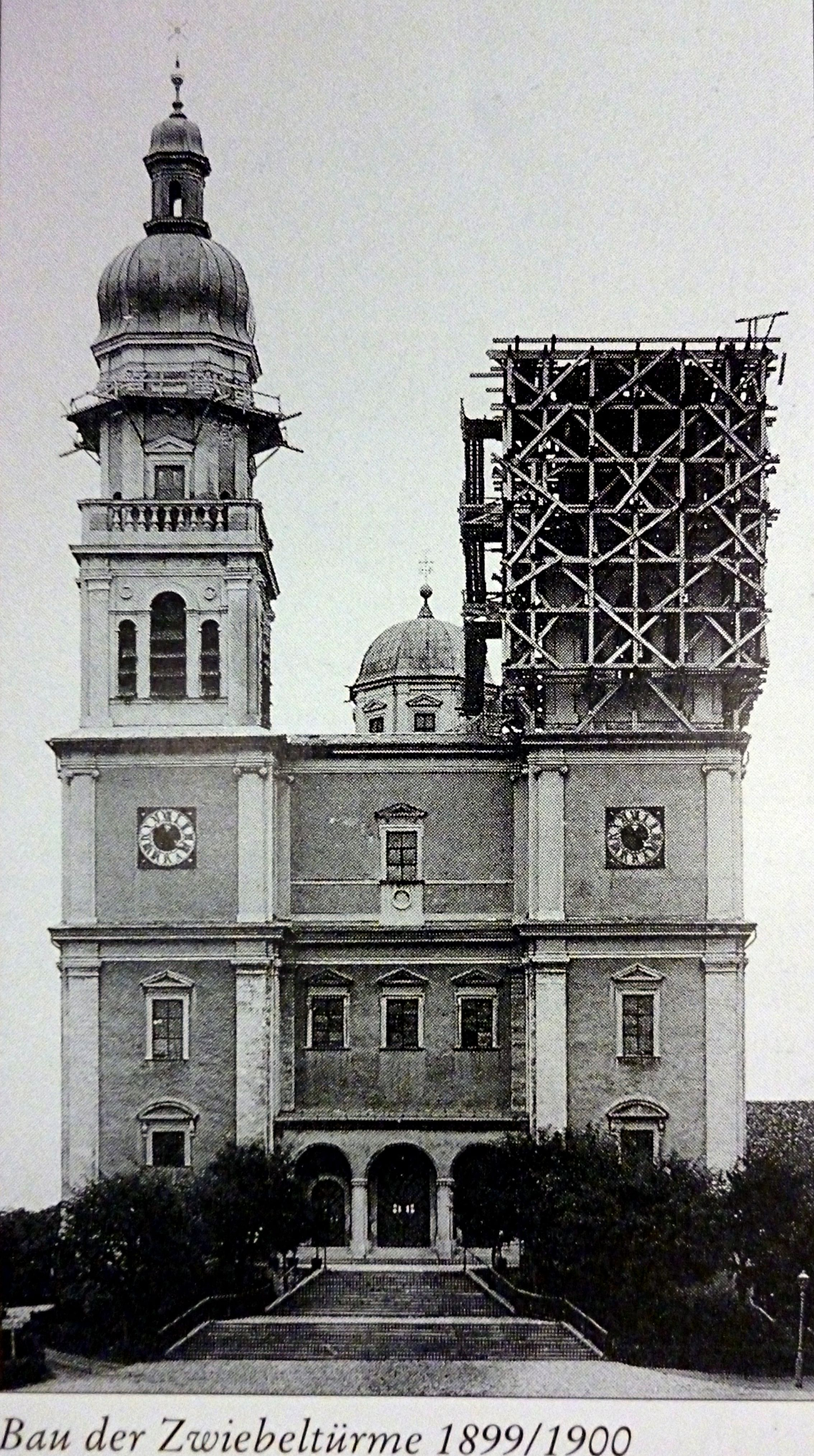 Bau der Zwiebeltürme